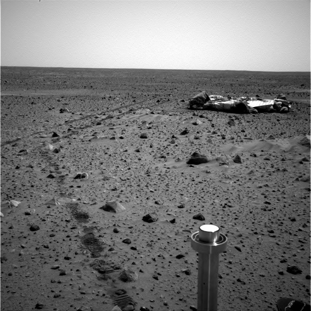 Le robot Spirit s'éloigne de sa base martienne.